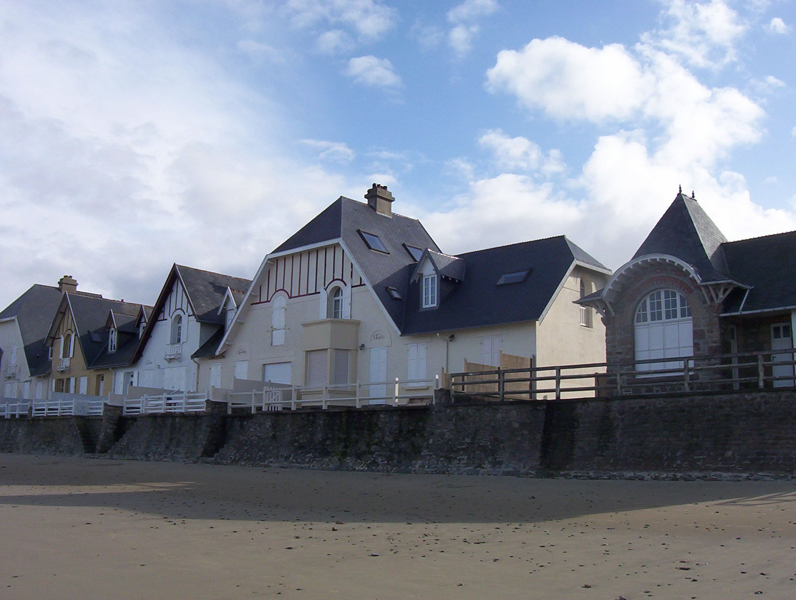 Villas en bord de mer, Urville-Nacqueville